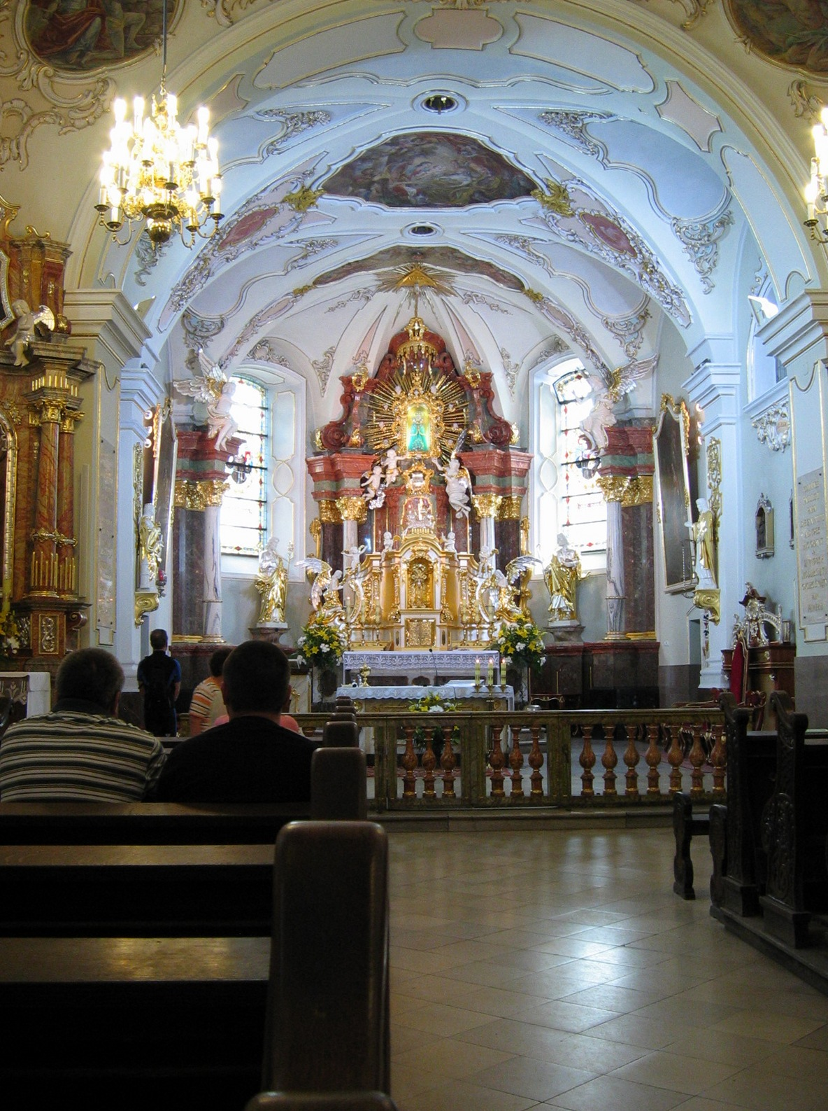 wnętrze kościoła św. Anny w klasztorze na Górze Św. Anny